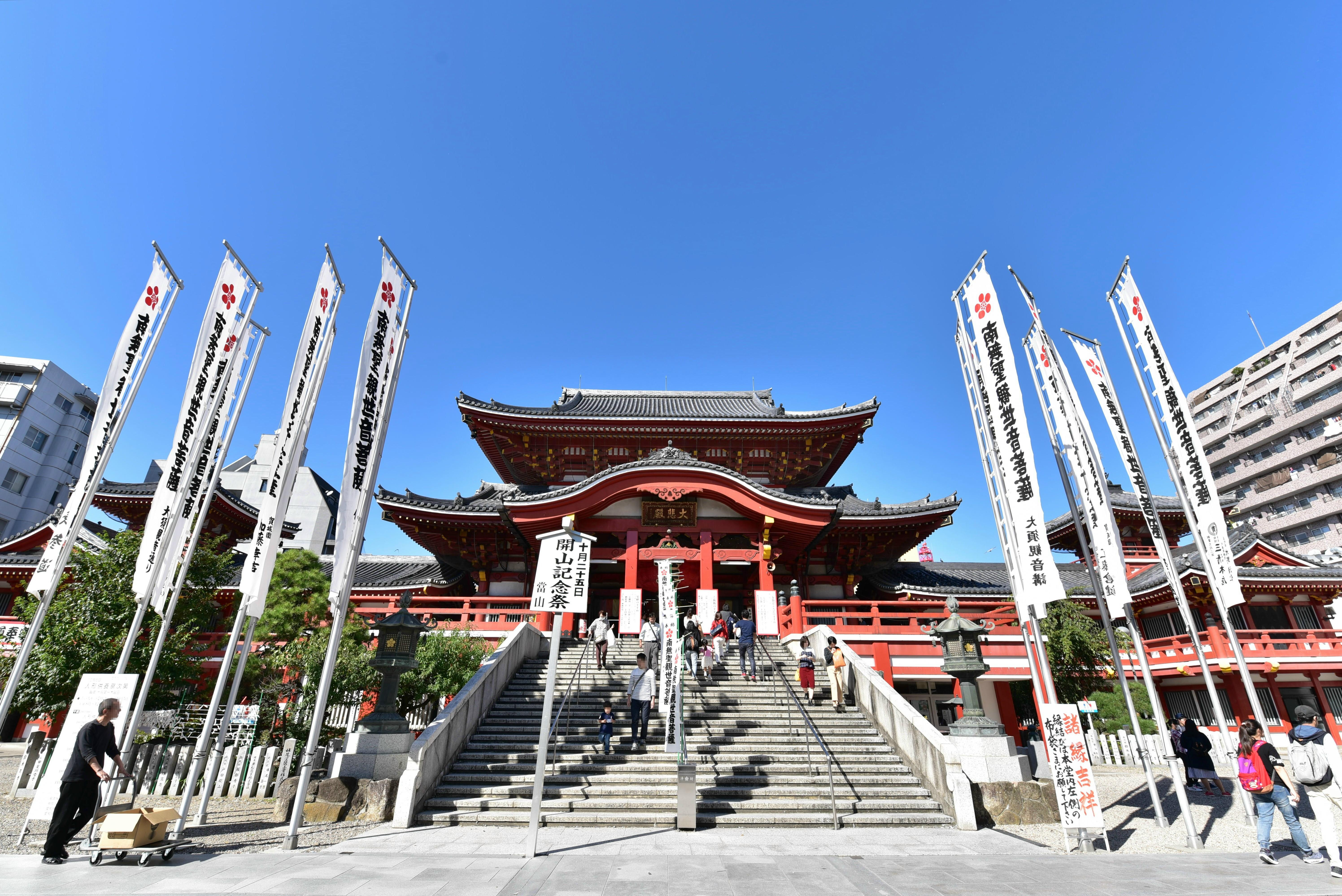 大須観音本堂